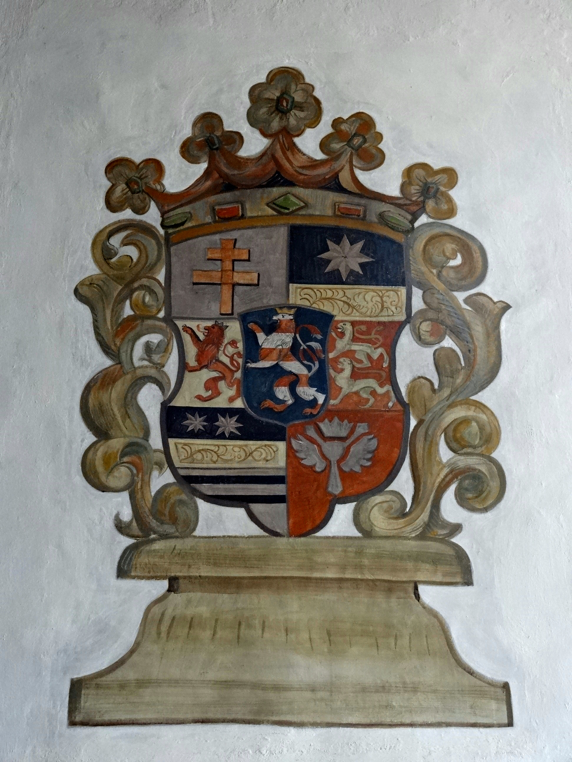 Evangelische Pfarrkirche (Gambach)